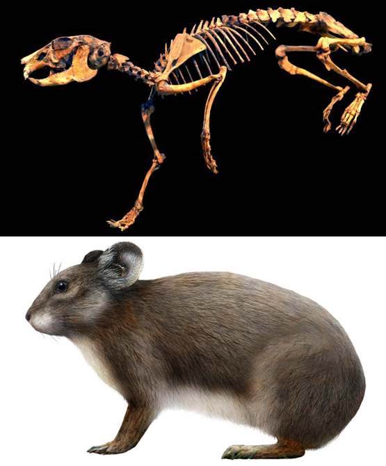 Ricostruzione scheletrica di Prolagus sardus conservata nel Museo PAS di Carbonia (CI - Sardegna, Italia) e ricostruzione in vita dell' animale.